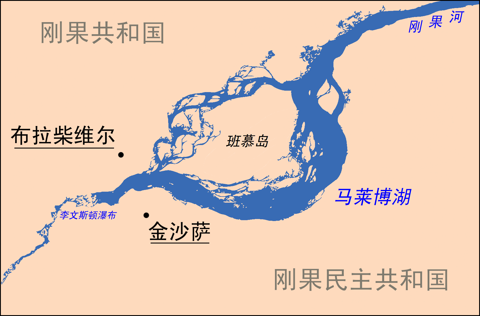 马莱博湖。